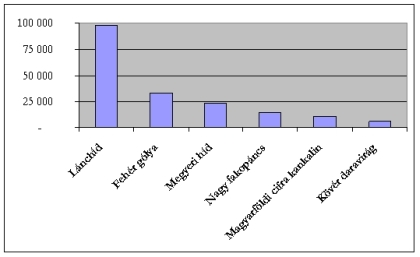 Szavazási eredmény a 200 Ft-os érméről